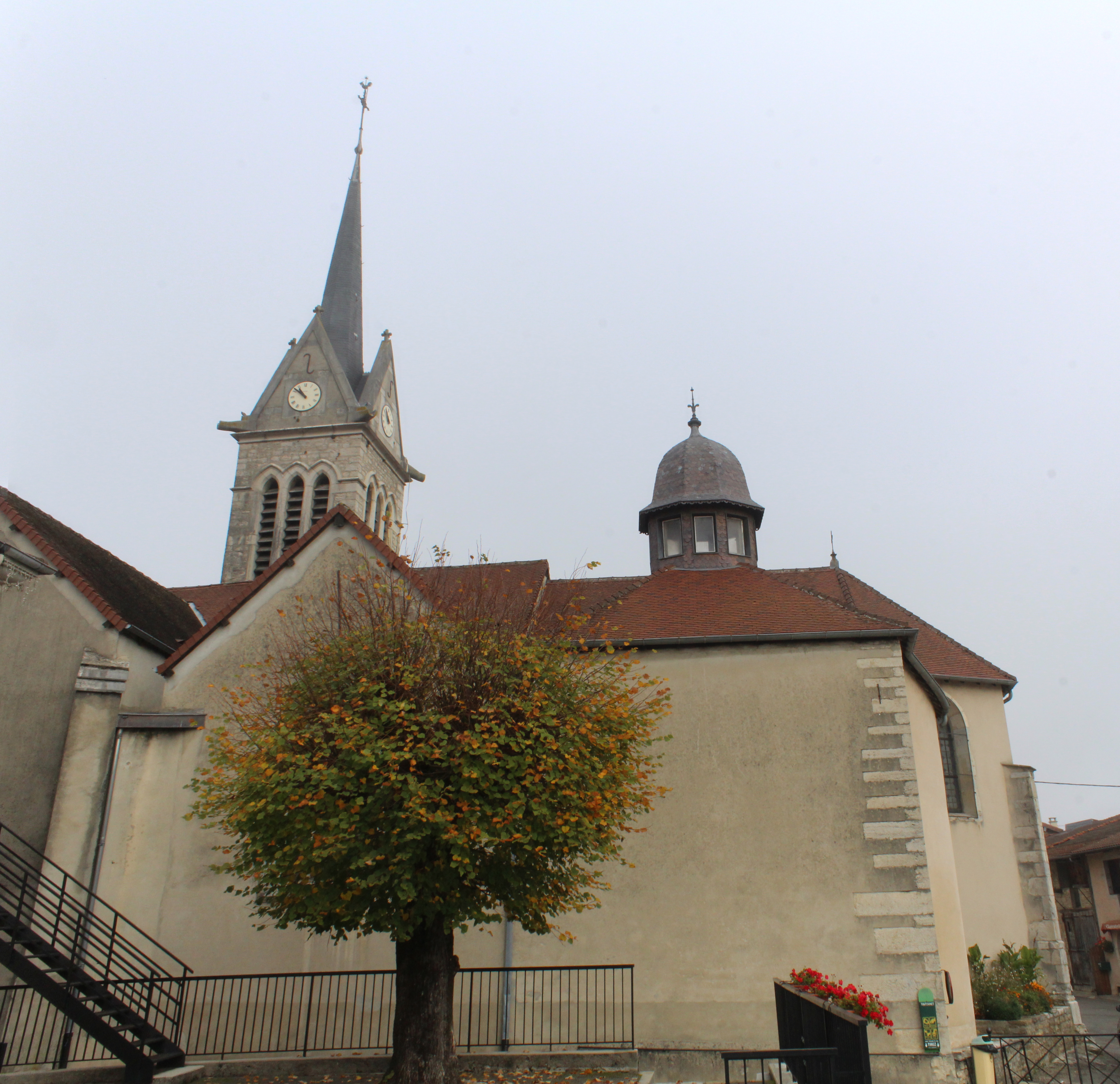 Église Saint-Jean-Baptiste de Saint-Julien, Val-Suran.